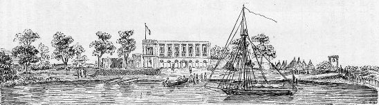 Le poste de Dagana, Sénégal (illustration dans Colonel Frey, Côte occidentale d'Afrique, 1890)